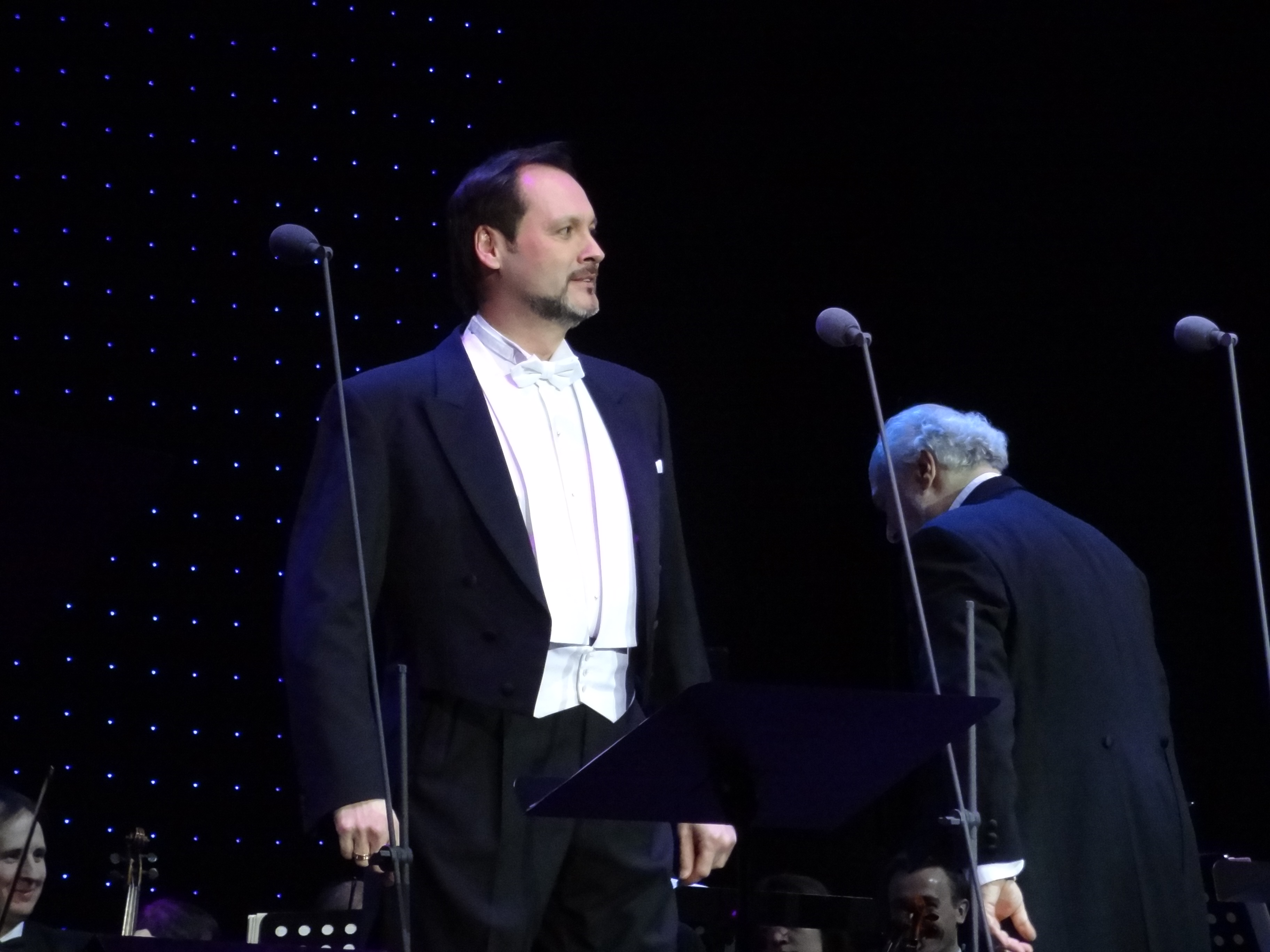 Санкт-Петербург, 2013